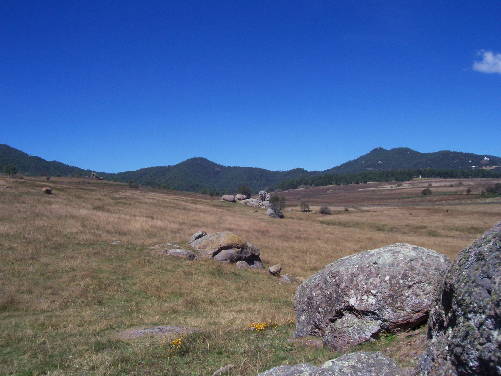 Orografía de Tapalpa.